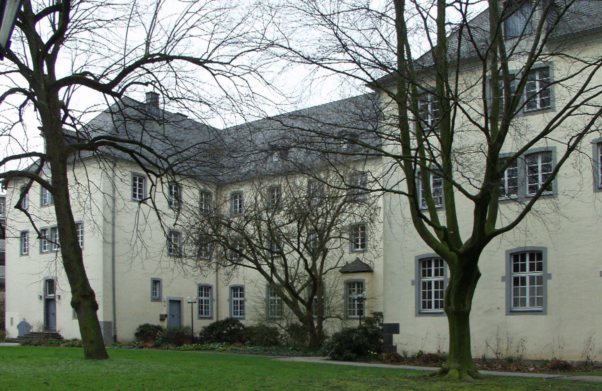 Das ehemalige Franziskanerkloster in Kempen This image shows a heritage building in Germany, located in the North Rhine-Westphalian city Kempen (no. 5).